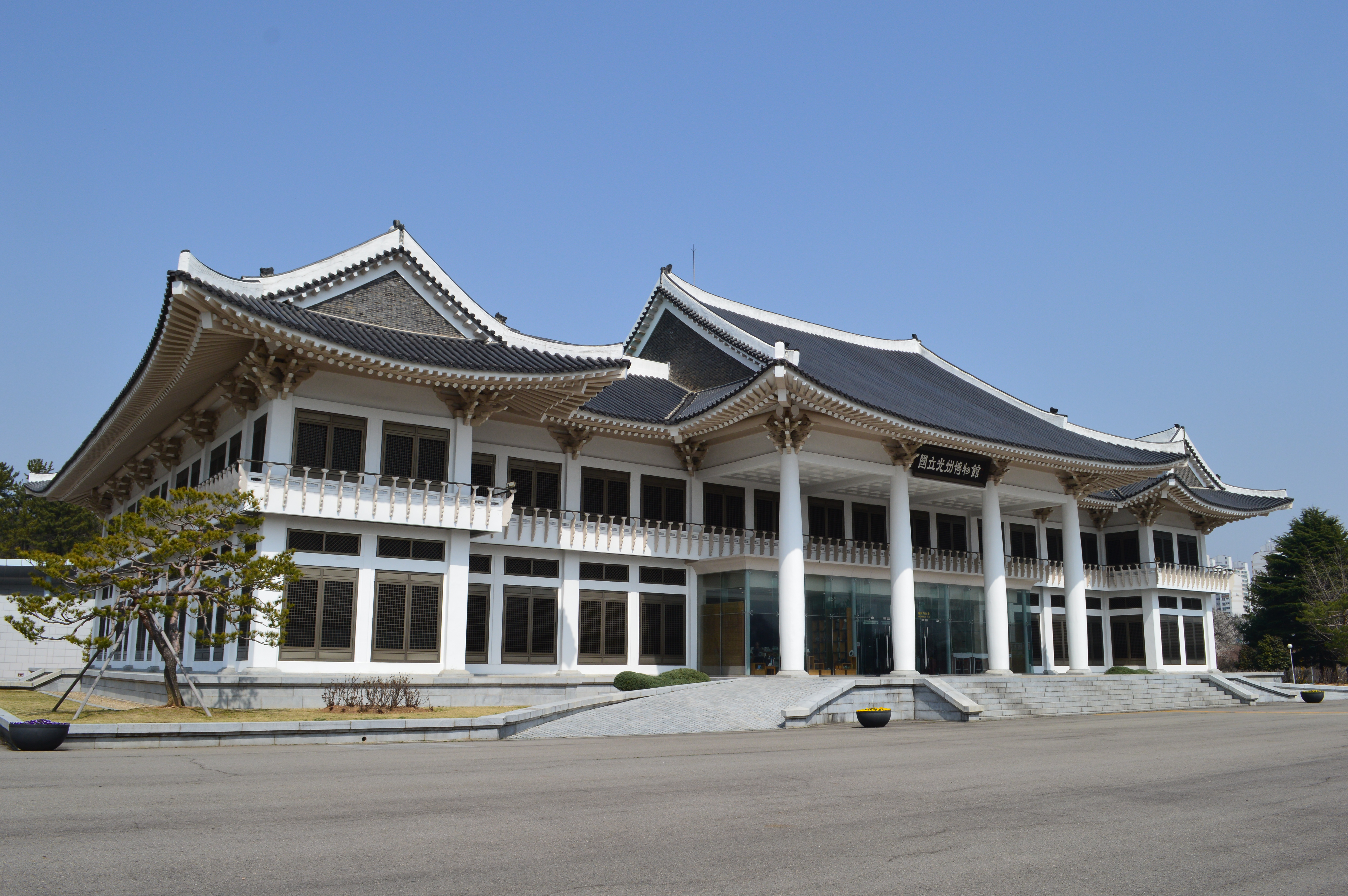 国立光州博物館 建物全景